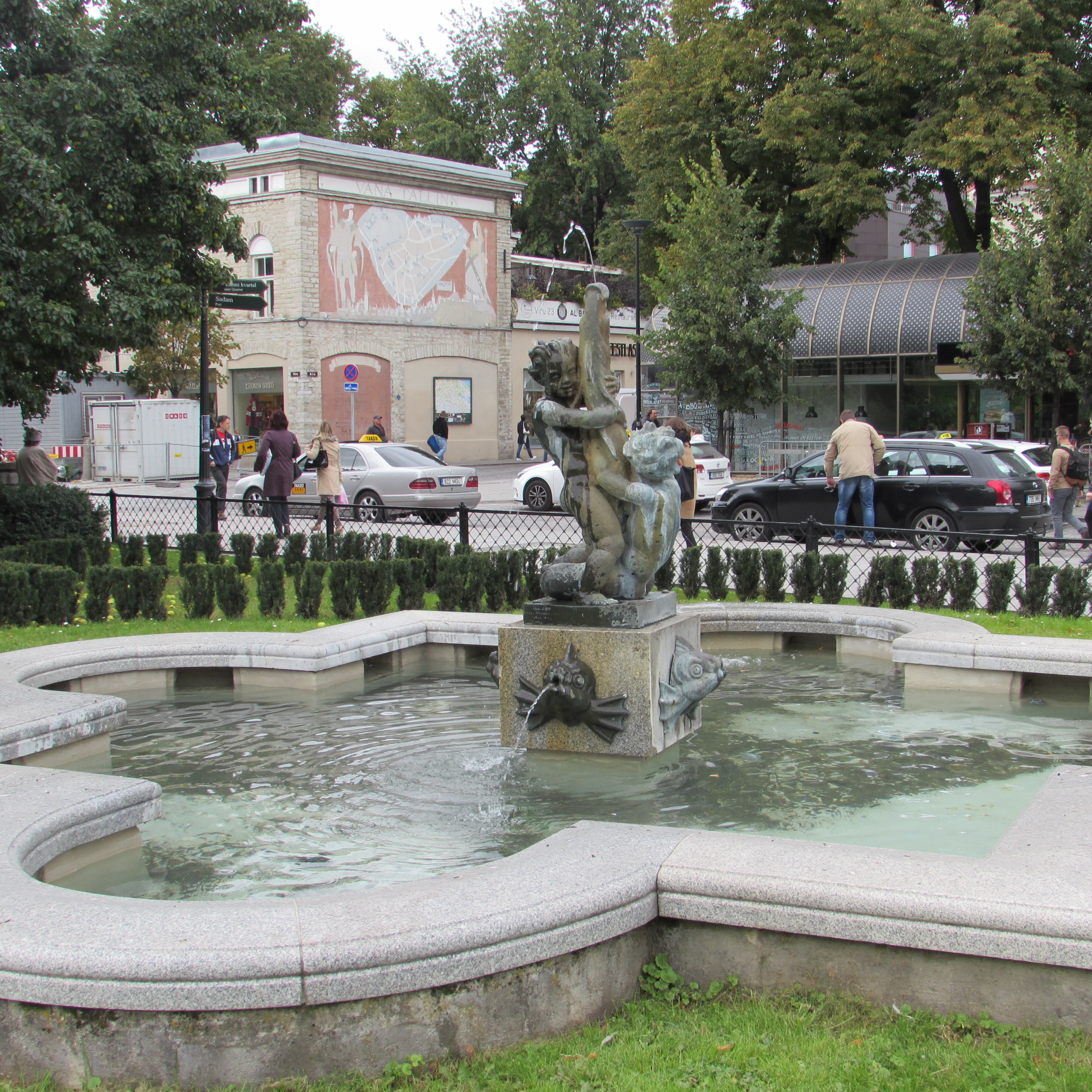 Tallinn